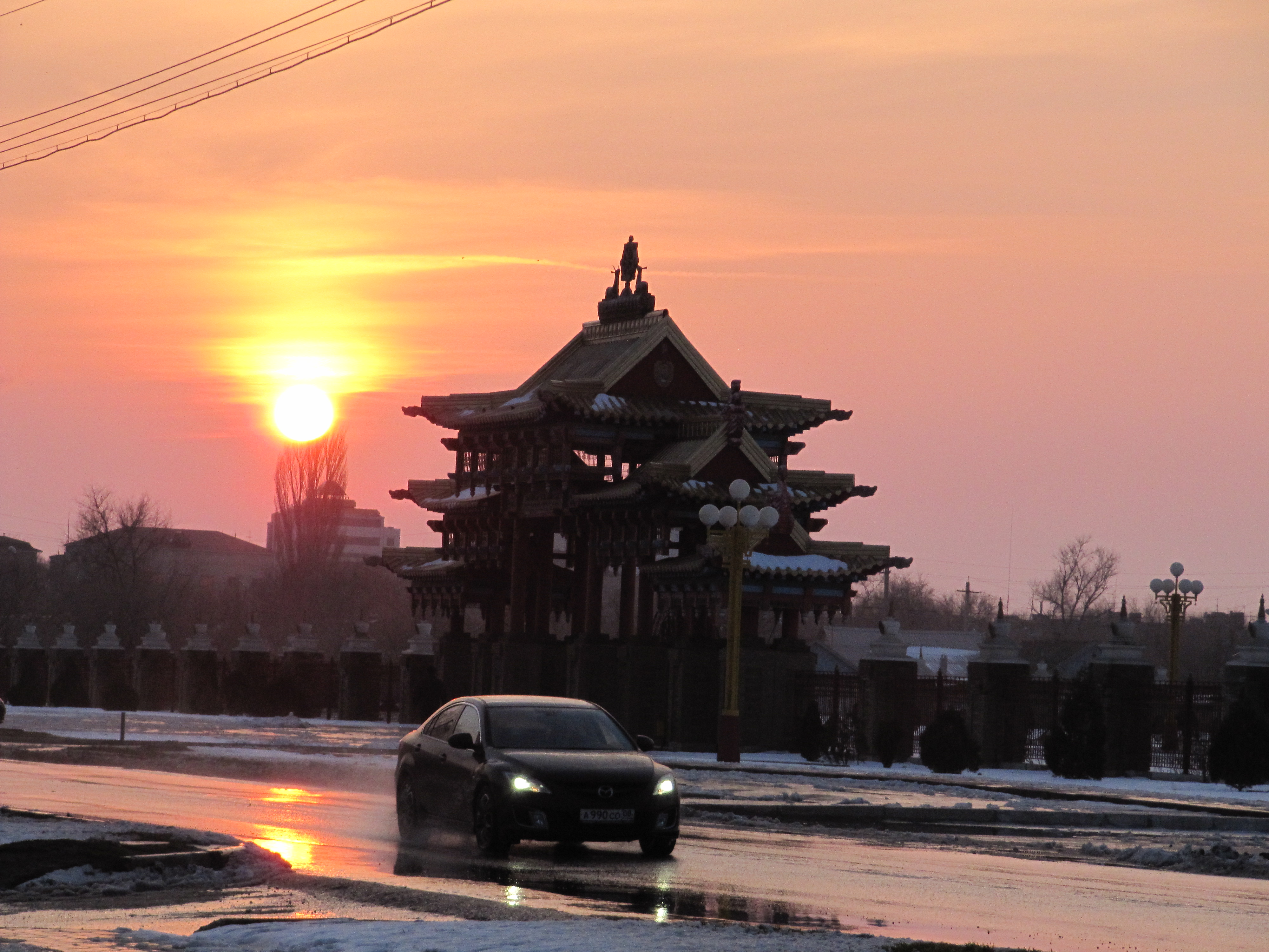 Вечерняя Элиста